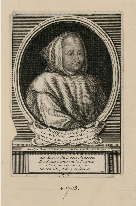 R.P. Innocent Le Masson (1627-1703), prieur général de l'ordre des Chartreux de 1675 à sa mort.